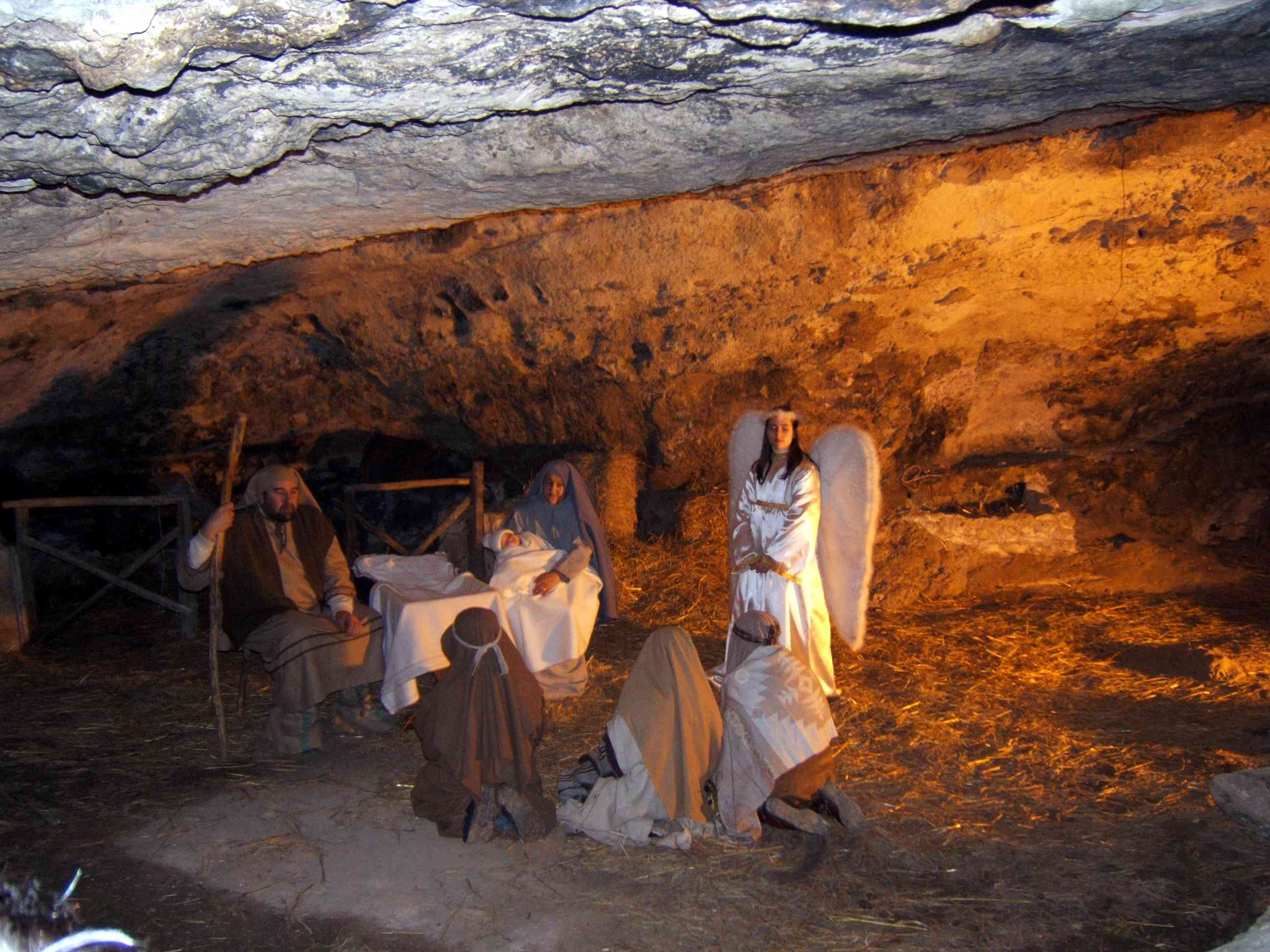 presepe di faggiano grotta della natività